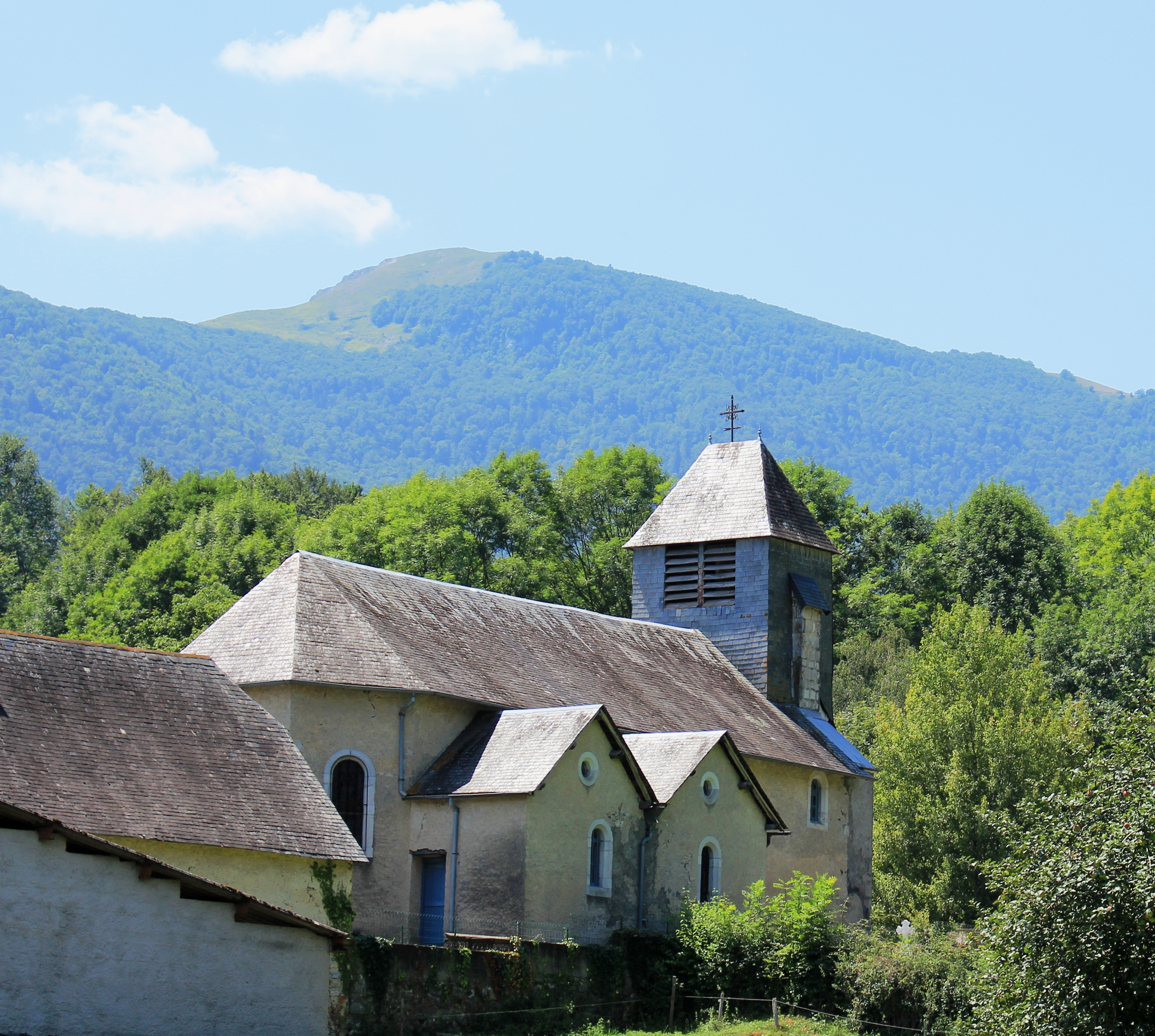 Église Saint-Blaise de Bulan (Hautes-Pyrénées)